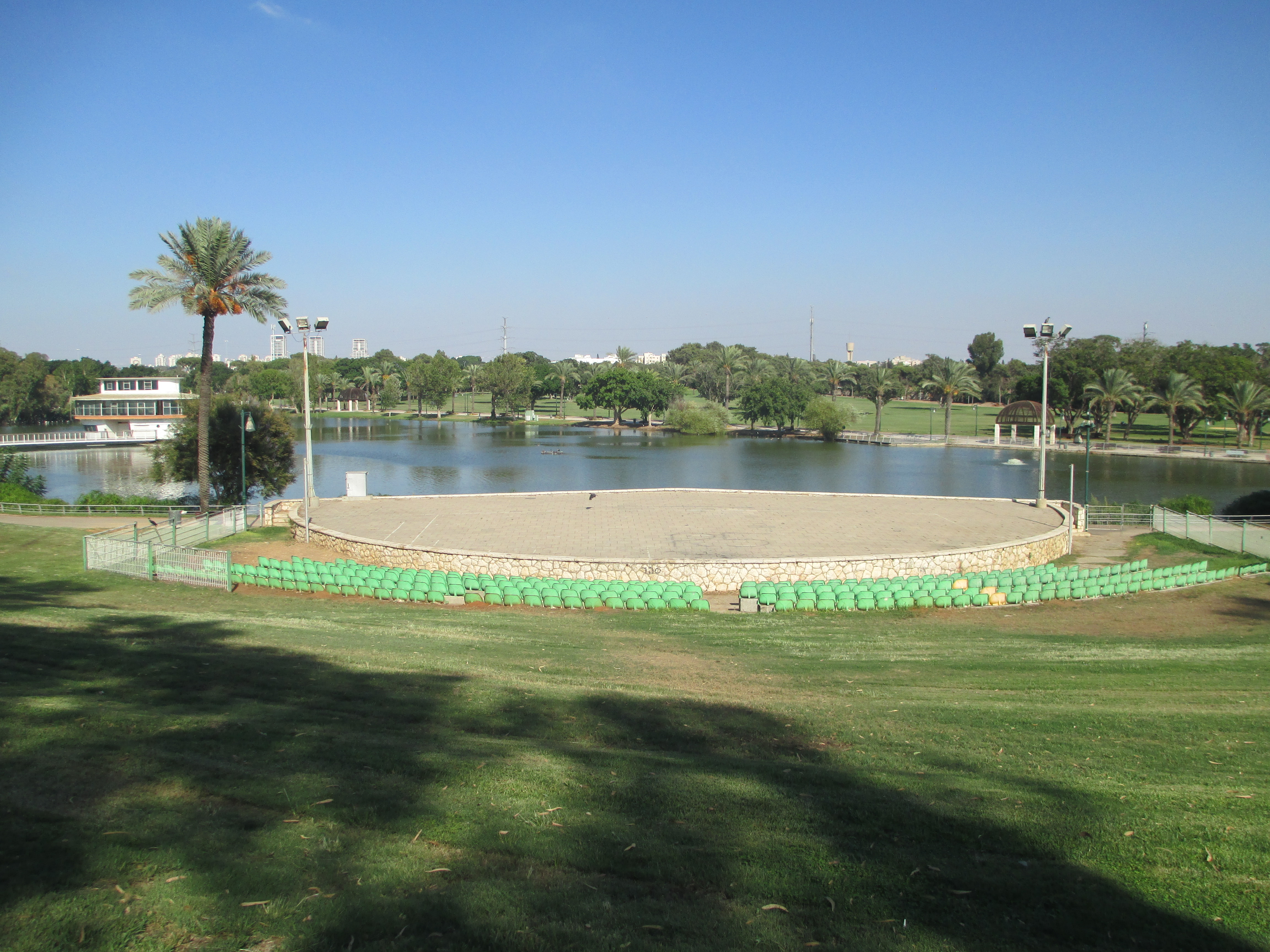 האמפיתיאטרון והאגם בפארק הלאומי